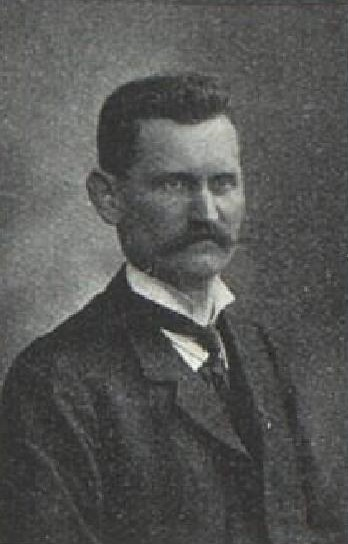 František Šmirous (1870-1940), rakouský a český politik